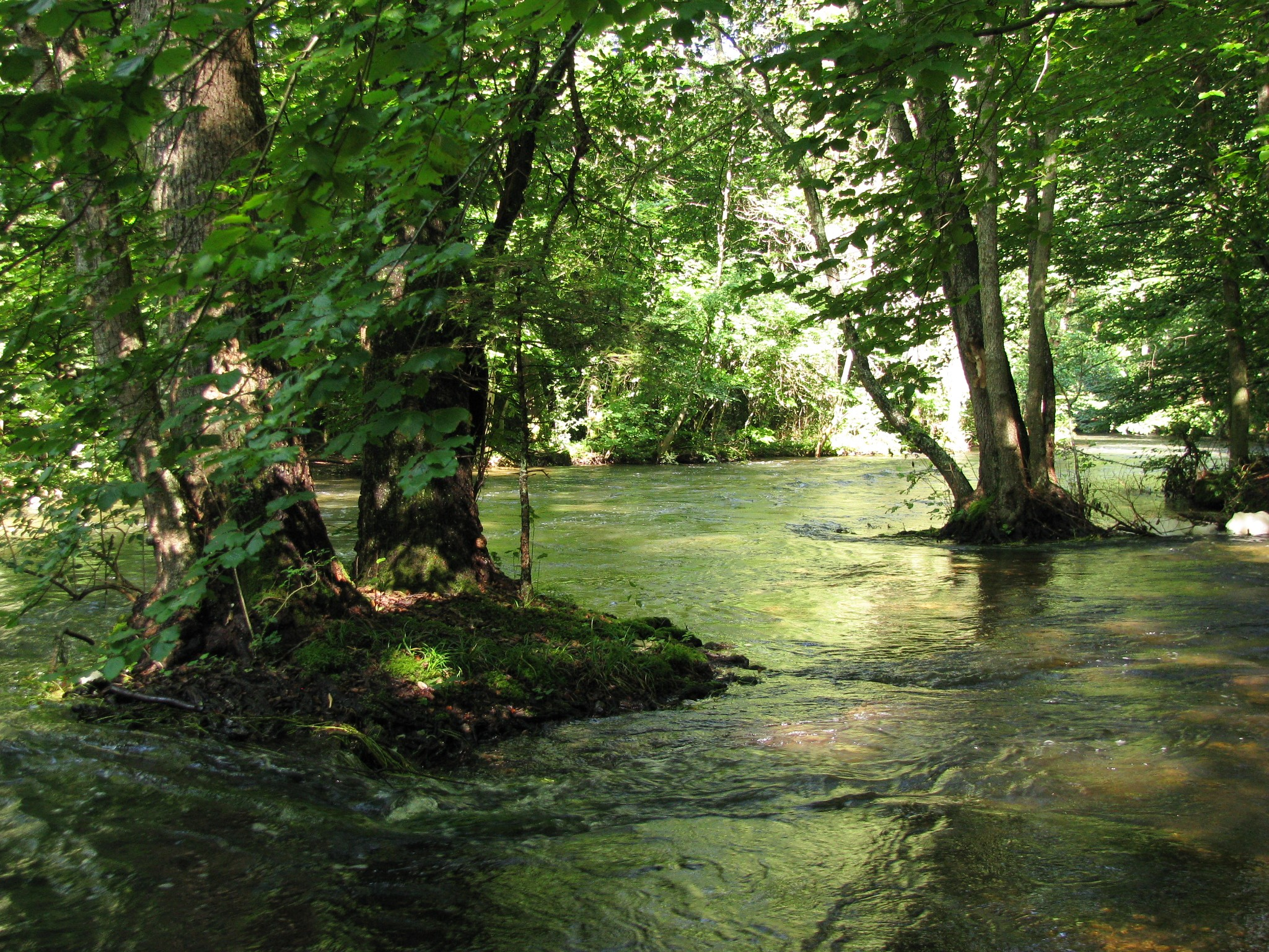 Würm im Mühltal unterhalb des Schlossberges